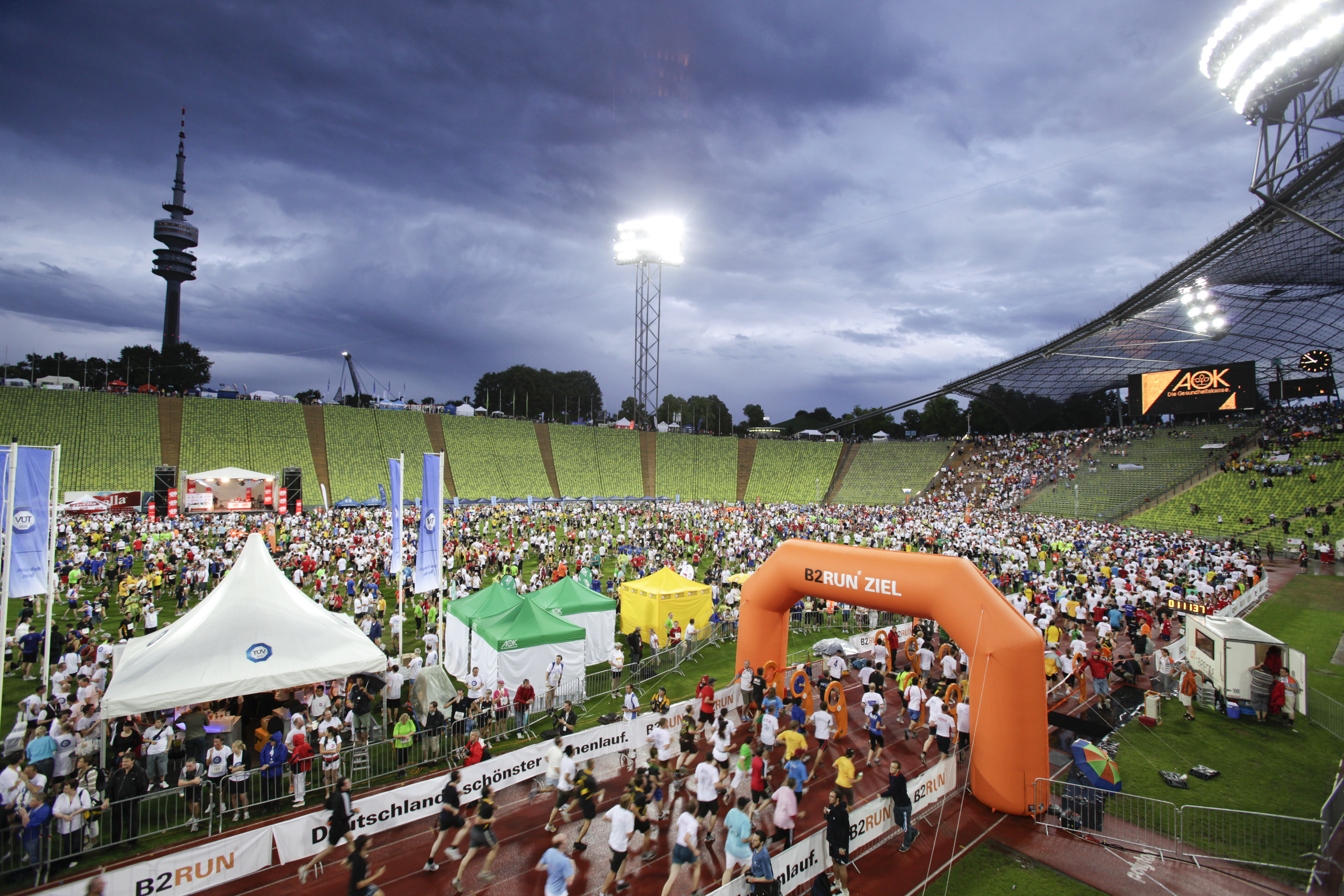 B2RUN München 2009, Zieleinlauf Olympiastadion (Foto: B2RUN GmbH & Co. KG, Oliver Farys)